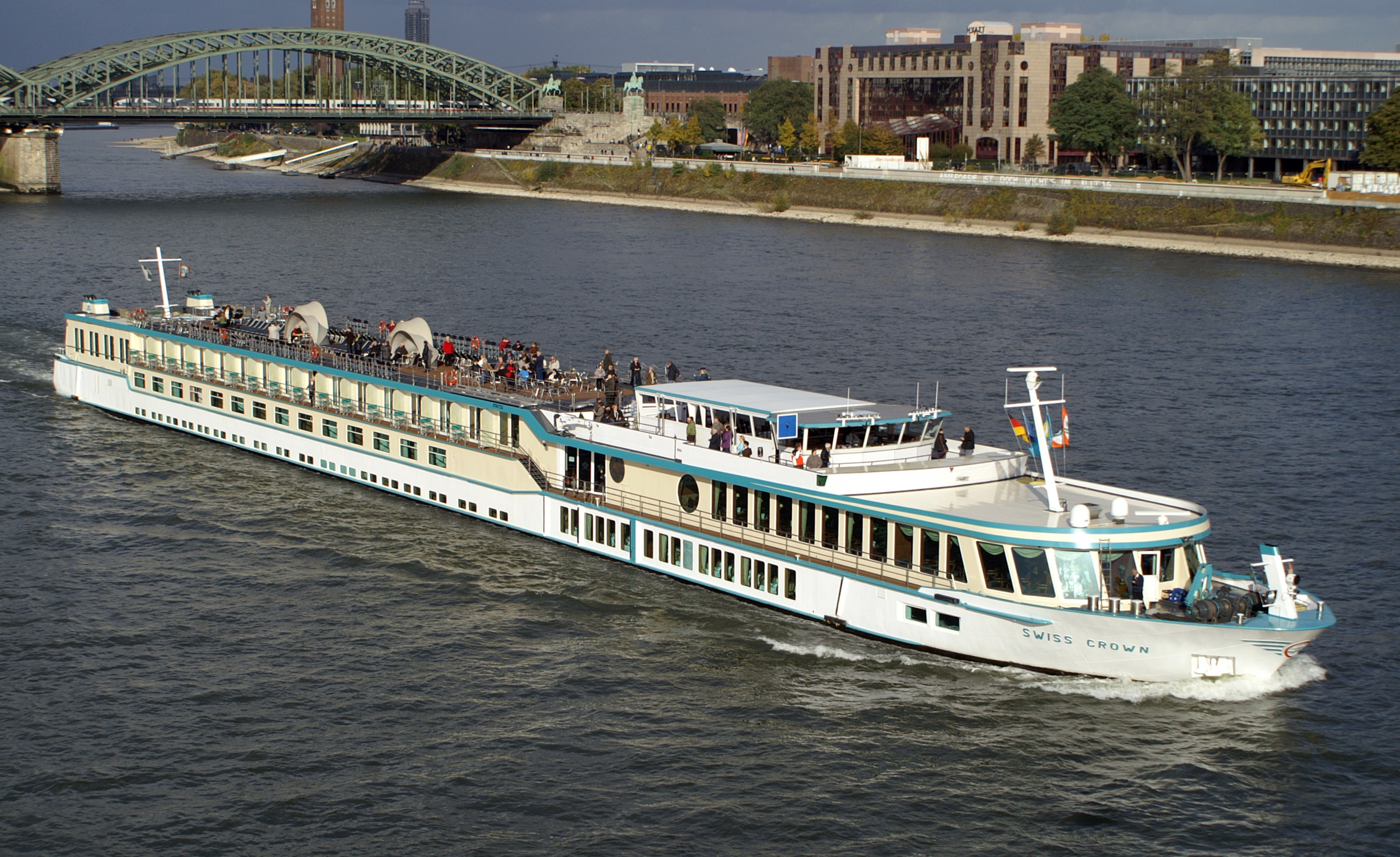 Swiss Crown auf Fahrt an der Hohenzollernbrücke in Köln.